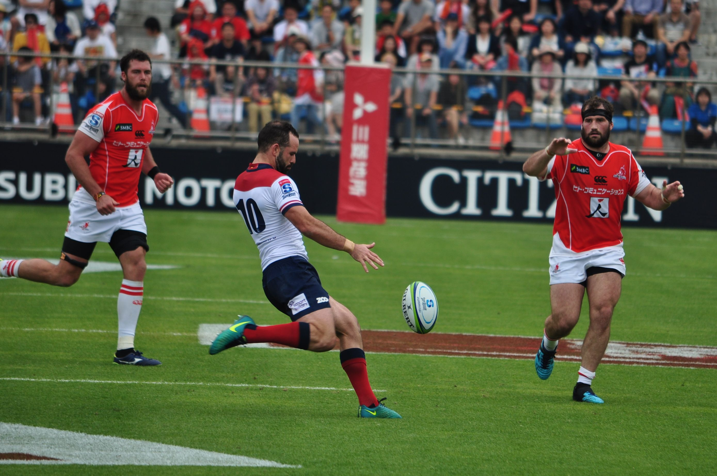 サンウルブズ vs レッズ戦